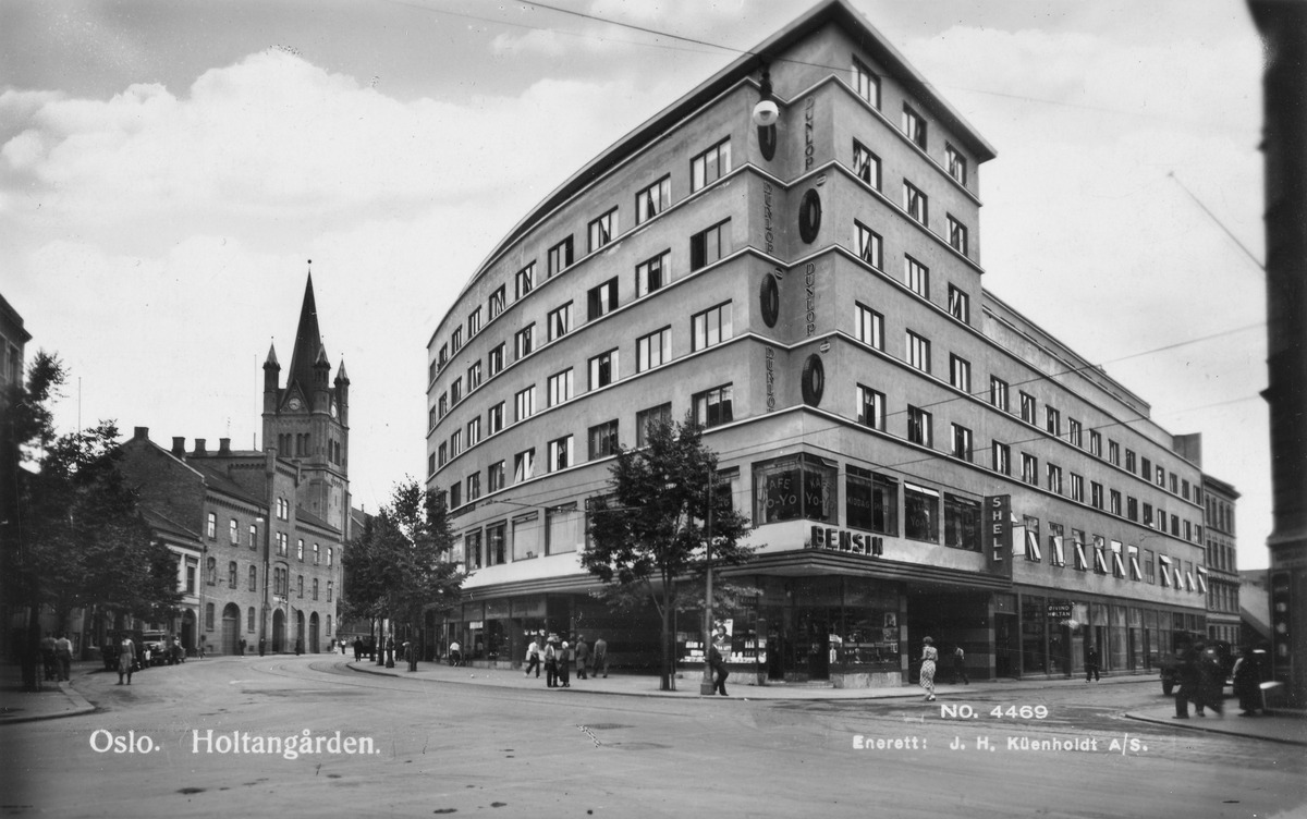 Holtangården, Grønlandsleiret 25, ca. 1945-50. Grønland kirke til venstre.